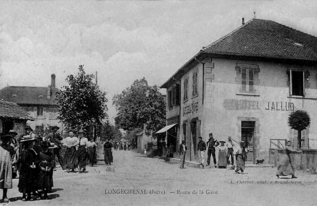 route de la gare. Longechenal, Isère, France. Carte postale ancienne, Ed. Charvat - Grand-Serre.